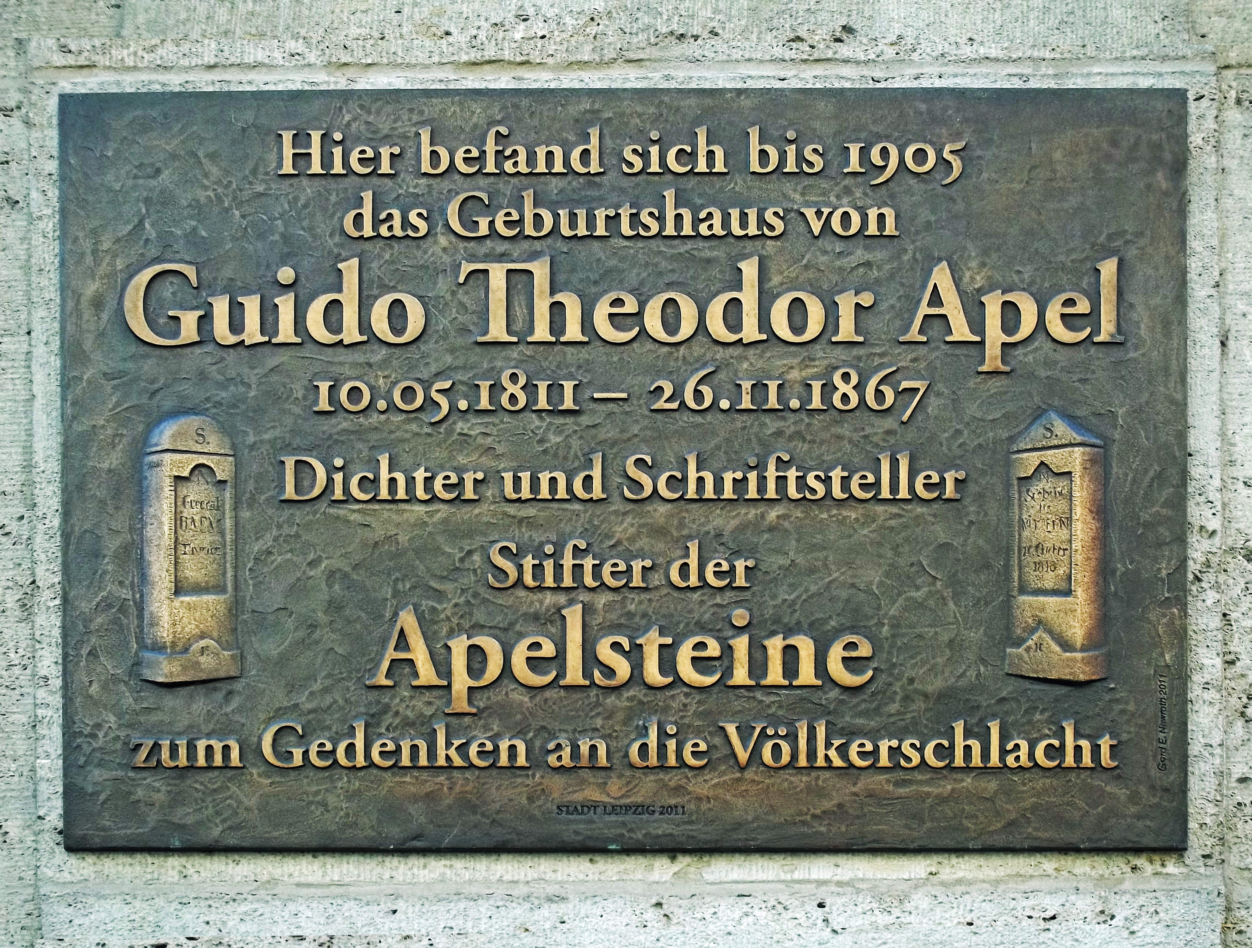 Tafel am Ort des Geburtshauses von Theodor Apel in Leipzig